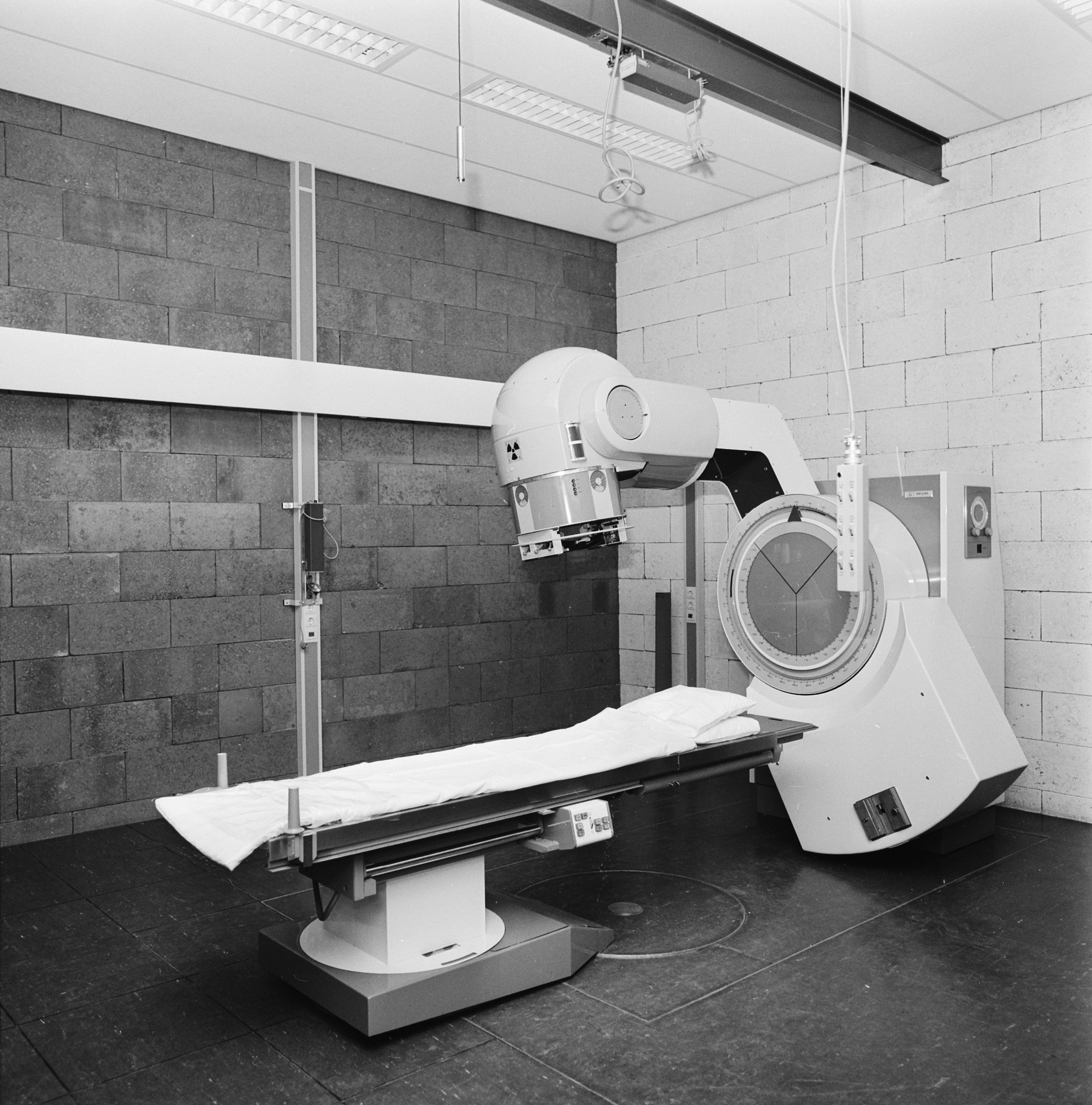 Officiële opening van het Antoni van Leeuwenhoek Ziekenhuis in Amsterdam. Kobaltstraler. Datum 29 oktober 1973